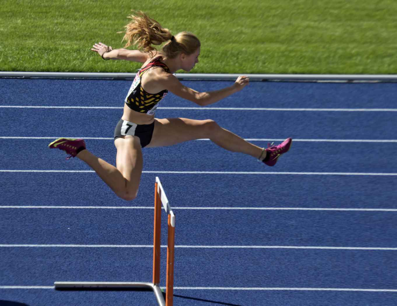 EKB10573 van puyvelde